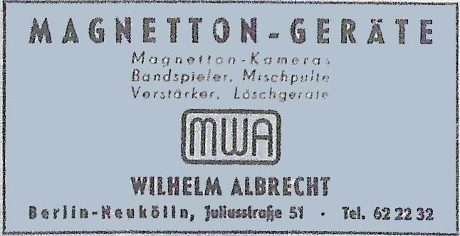 MWA frühe Anzeige